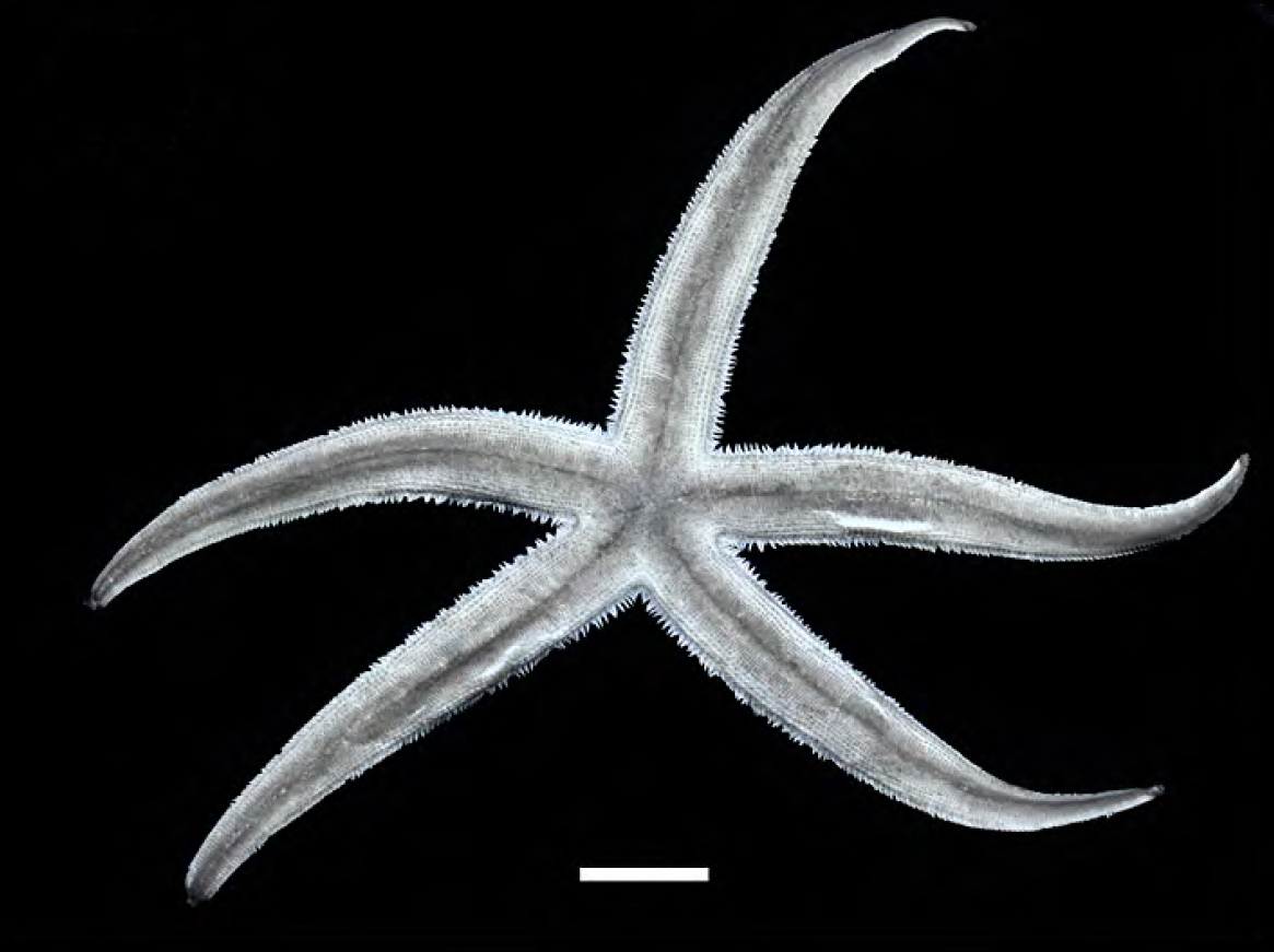 Figure 2. A: Luidia columbia (Gray, 1840), dorsal view. Scale bar: 2 cm.